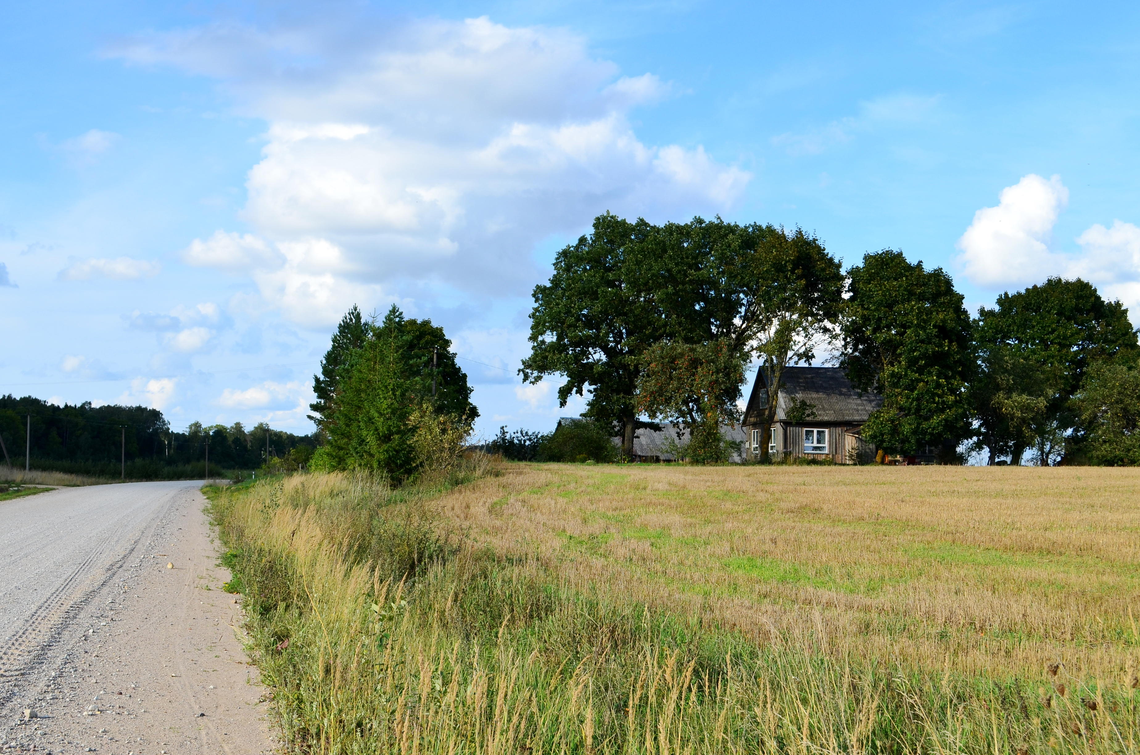 Čerkosai, Radviliškio raj.